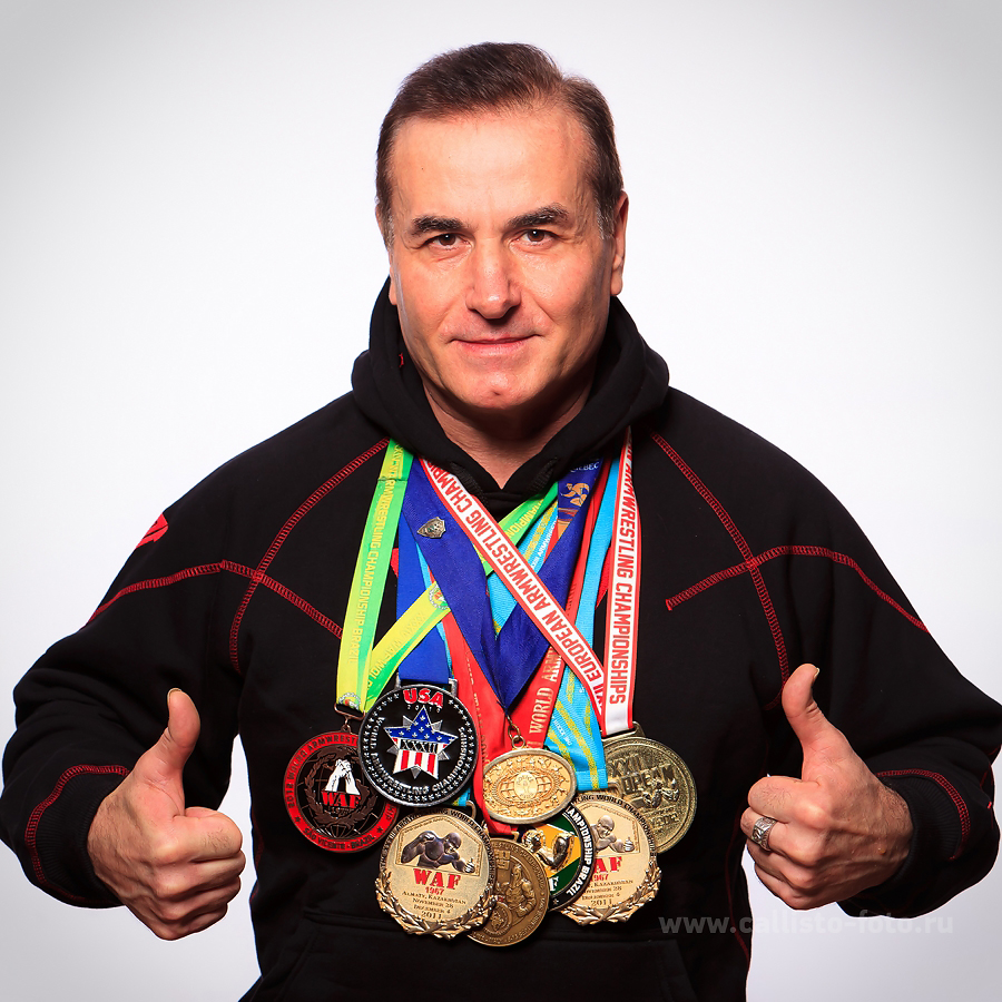 Российский армрестлер Владимир Степанов в 2013 году.